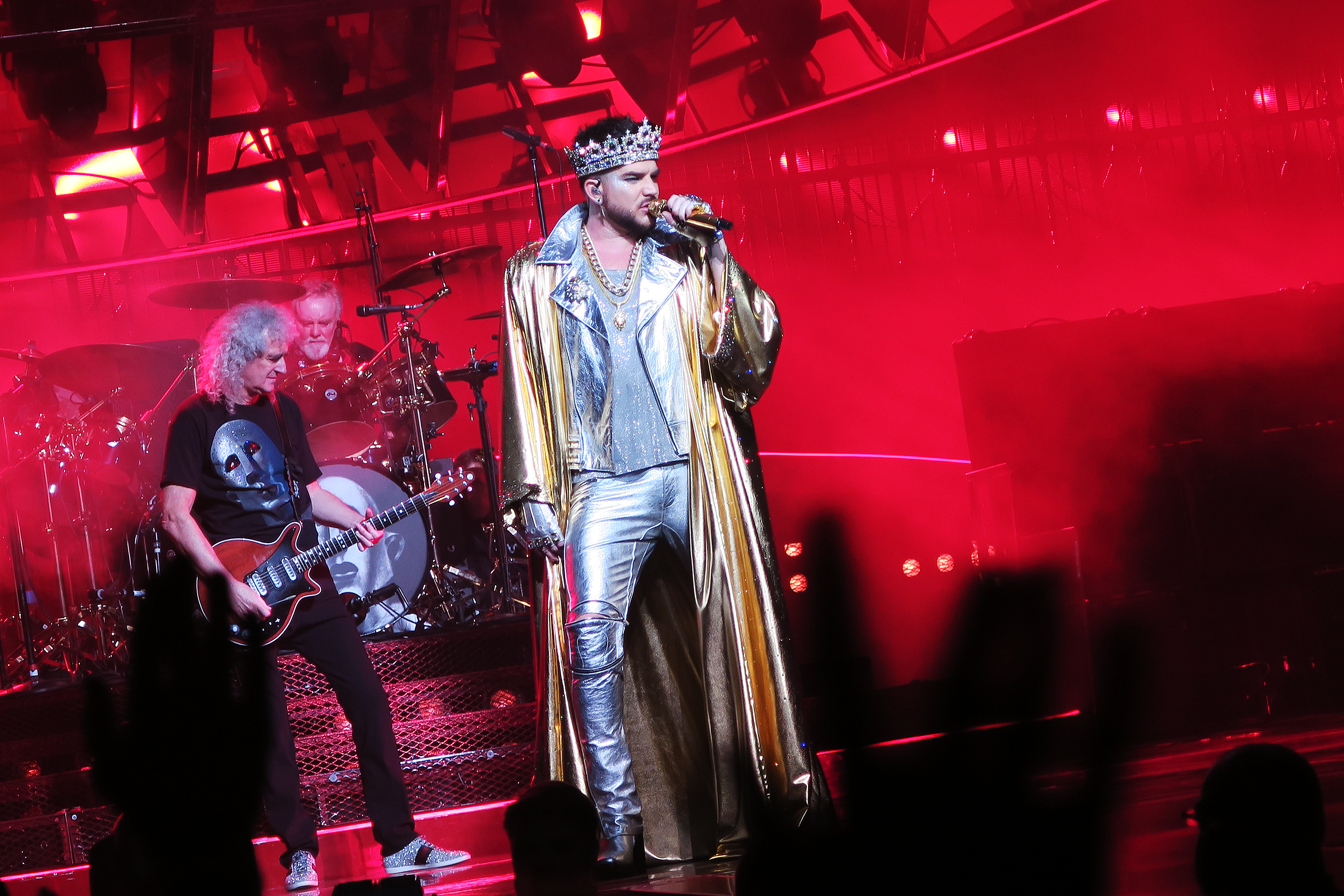 IMG_2138a